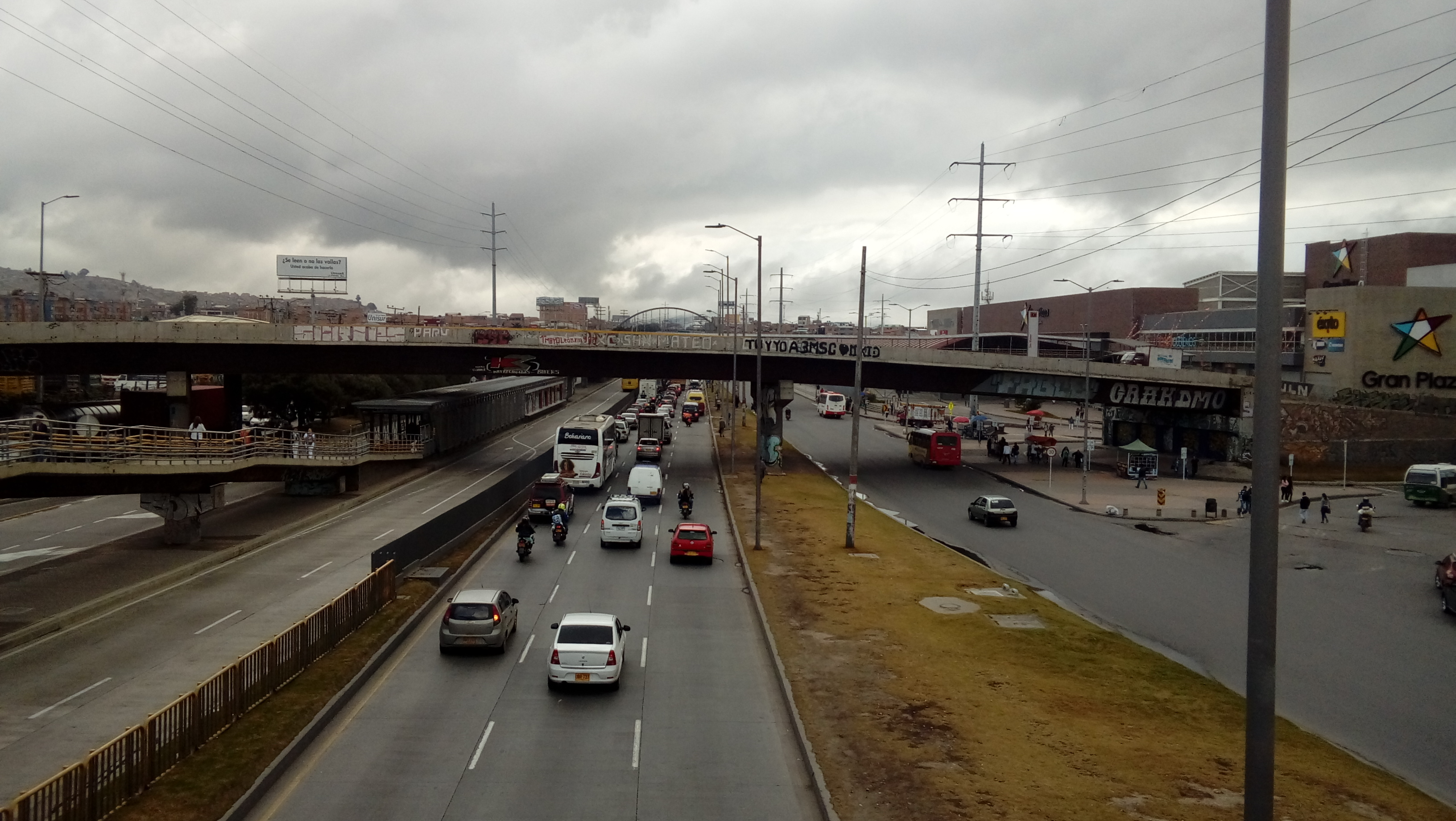 A los costados la estación San Mateo, a la derecha Gran Plaza Soacha, y al fondo el puente de arco